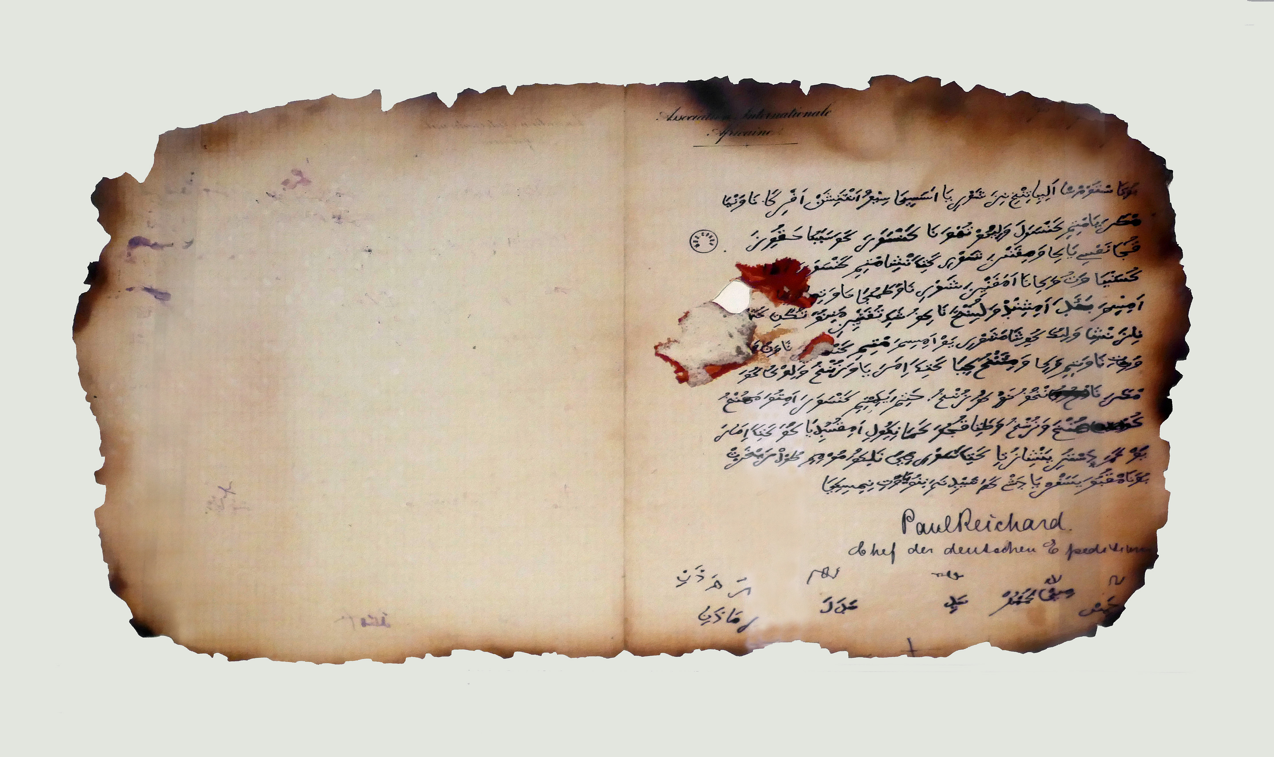 Manuscrit kiswahili en caractères arabes adaptés Acte de soumission d'un chef congolais au lieutenant belge Emile Stoms Reproduction, avant 1880 Africa Museum, Tervuren